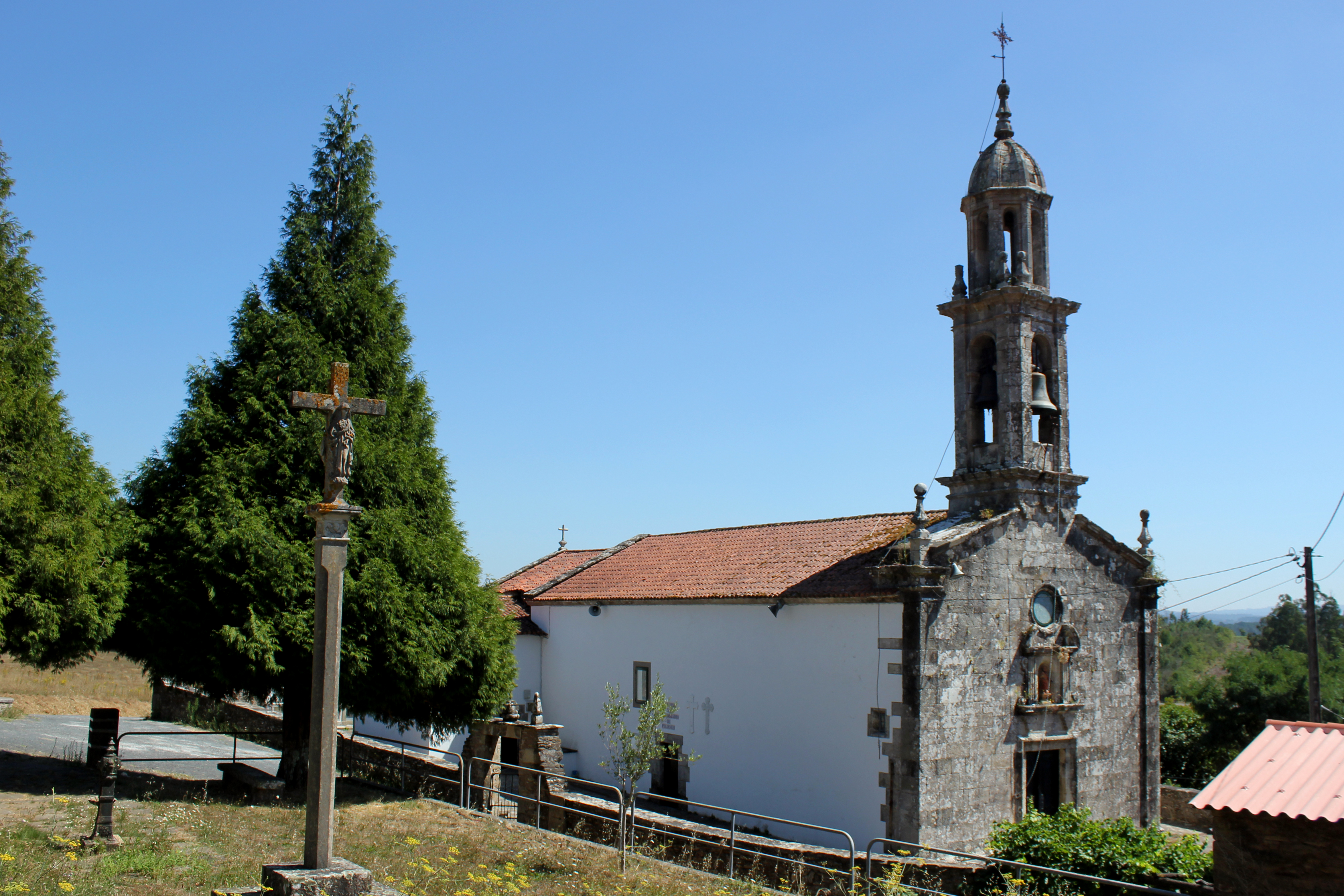 Igrexa de Foxás no concello de Touro.